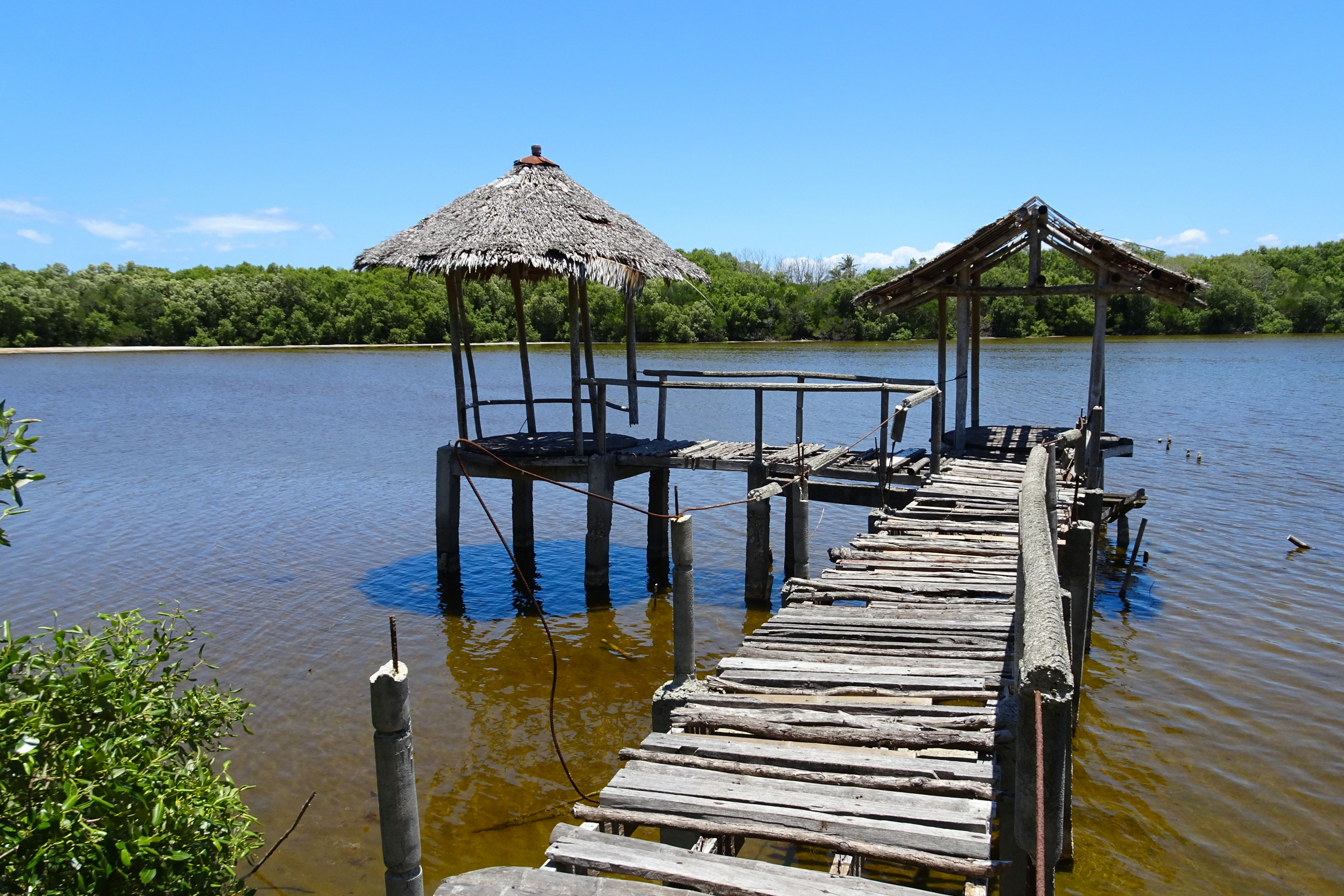 Cabilao Island Lake, Bohol, Philippines